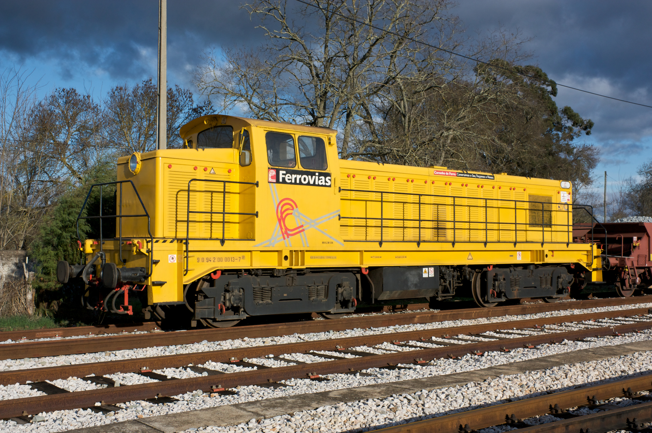 Local: Estação de Portalegre [Linha do Leste, PK 216 • Linha de Évora, PK 239] Data e hora: 9 de Dezembro de 2008 [15h34] Material: Locomotiva 1204 [Brissonneau & Lotz • Sorefame] N.º UIC: 90 94 200 0013-7 P (Ferrovias MVLM 04)